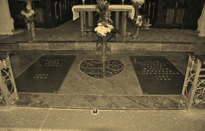 Náhrobky Václava II. a Elišky Přemyslovny na Zbraslavi